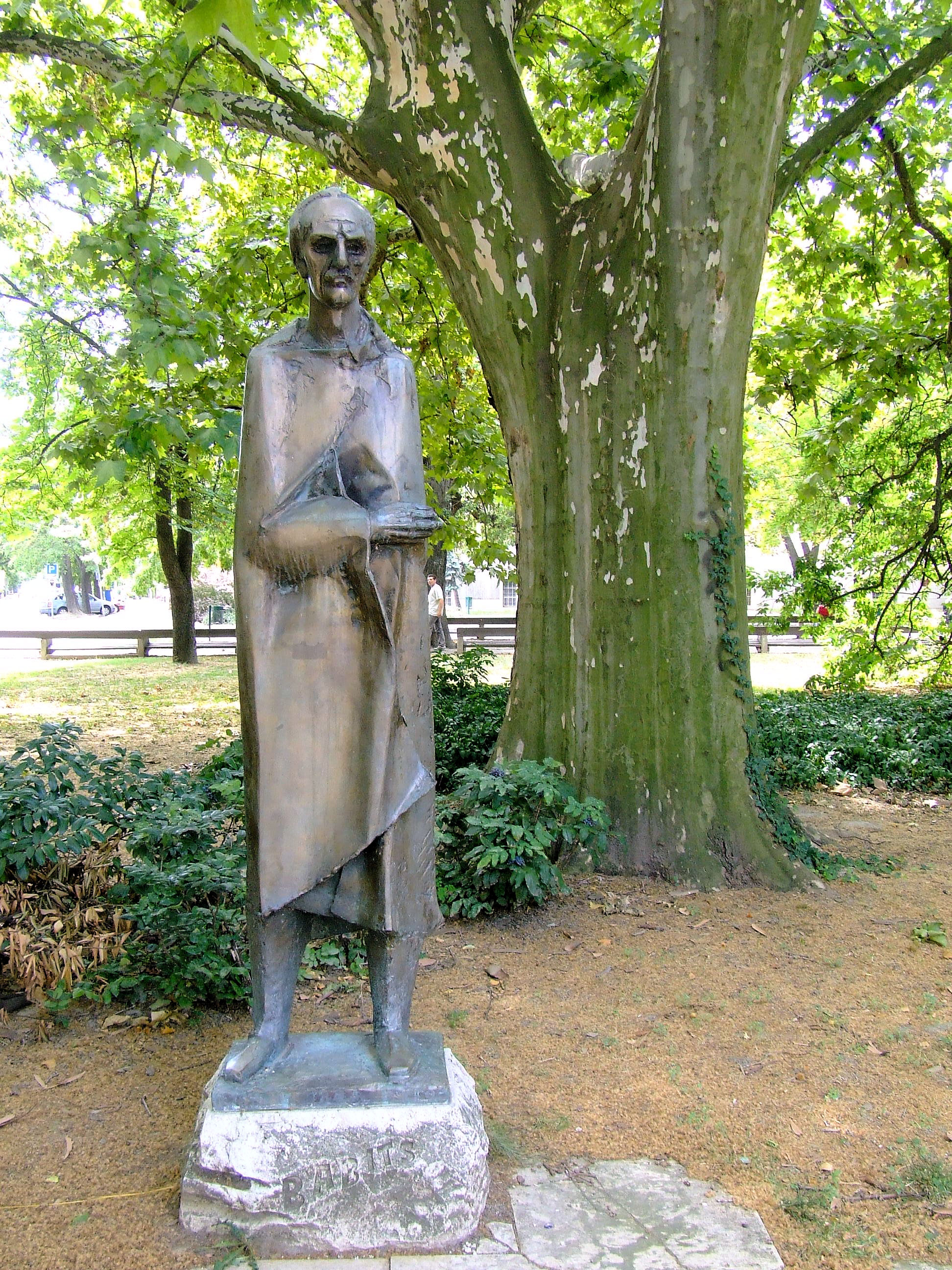 Babits Mihály szobra Szekszárdon. Kiss Kovács Gyula (1922–1984) alkotása (1971)